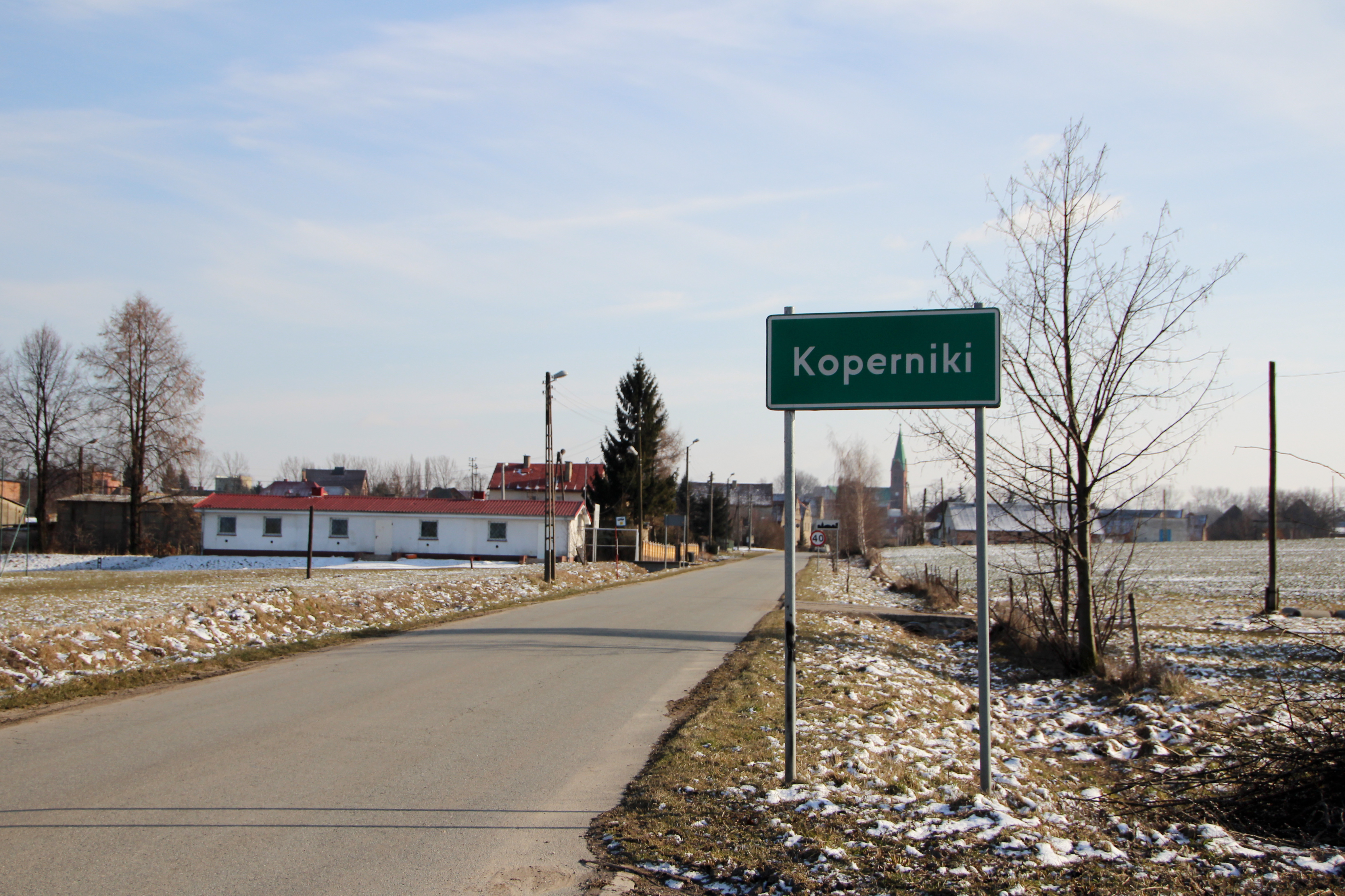 Koperniki – wieś w Polsce, w województwie opolskim, w powiecie nyskim, w gminie Nysa.